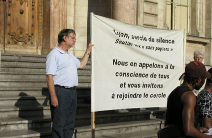 « Cercle de silence » à Lyon, place des Terreaux, devant l'hôtel de ville en juillet 2008.